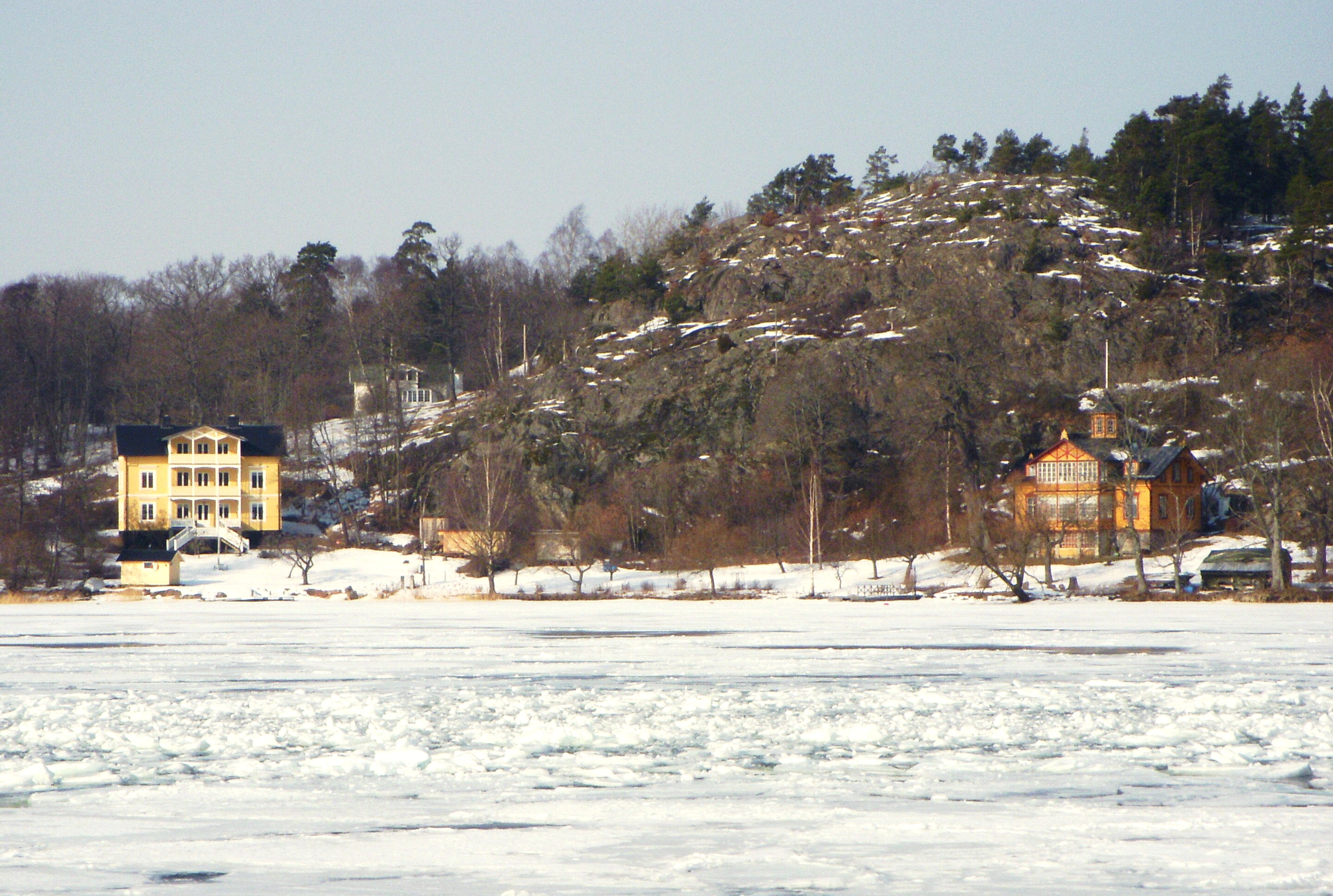 Bebyggelsen på Kungshatt